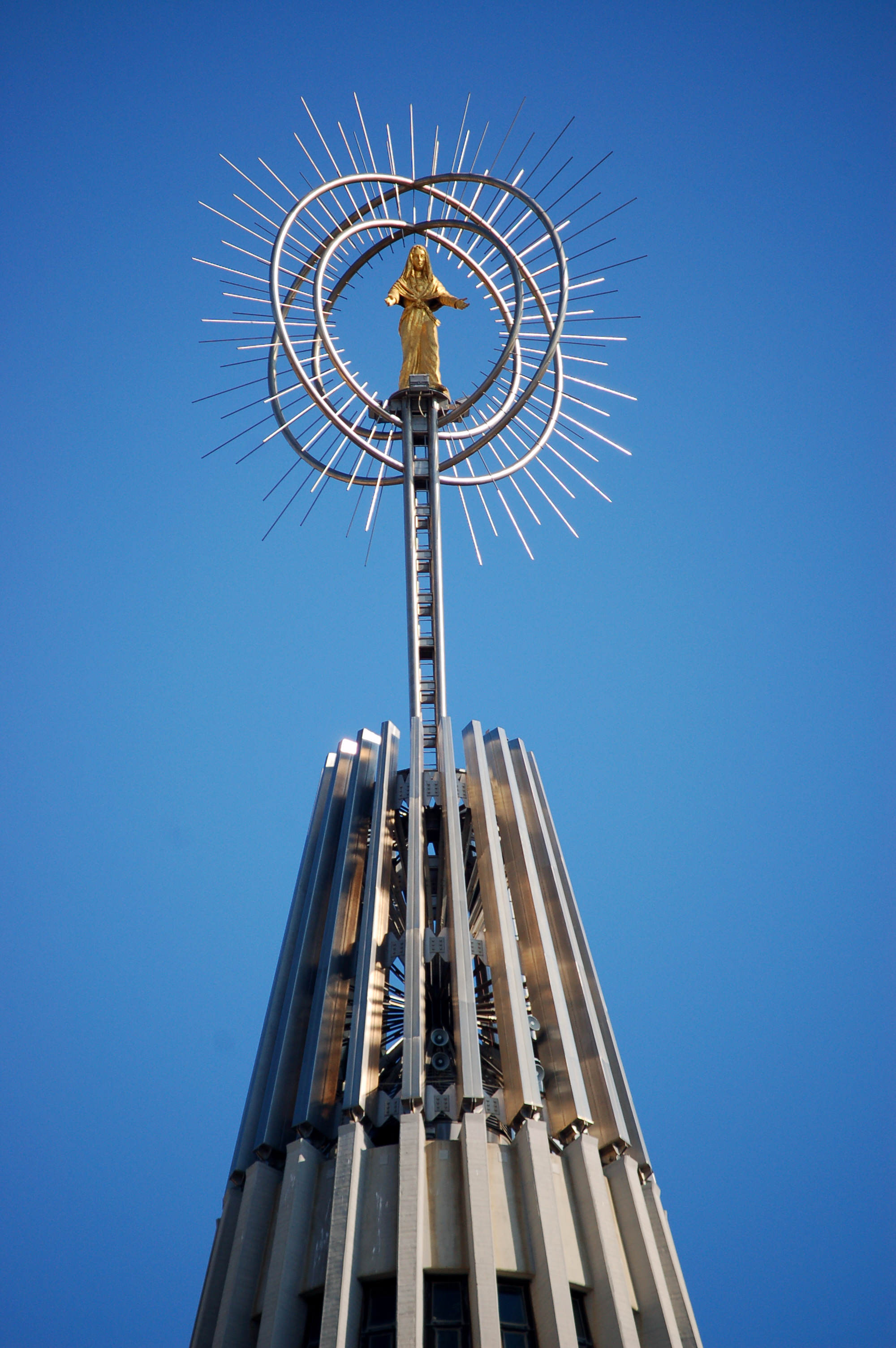 Siracusa, ITA - Santuario Madonna delle lacrime